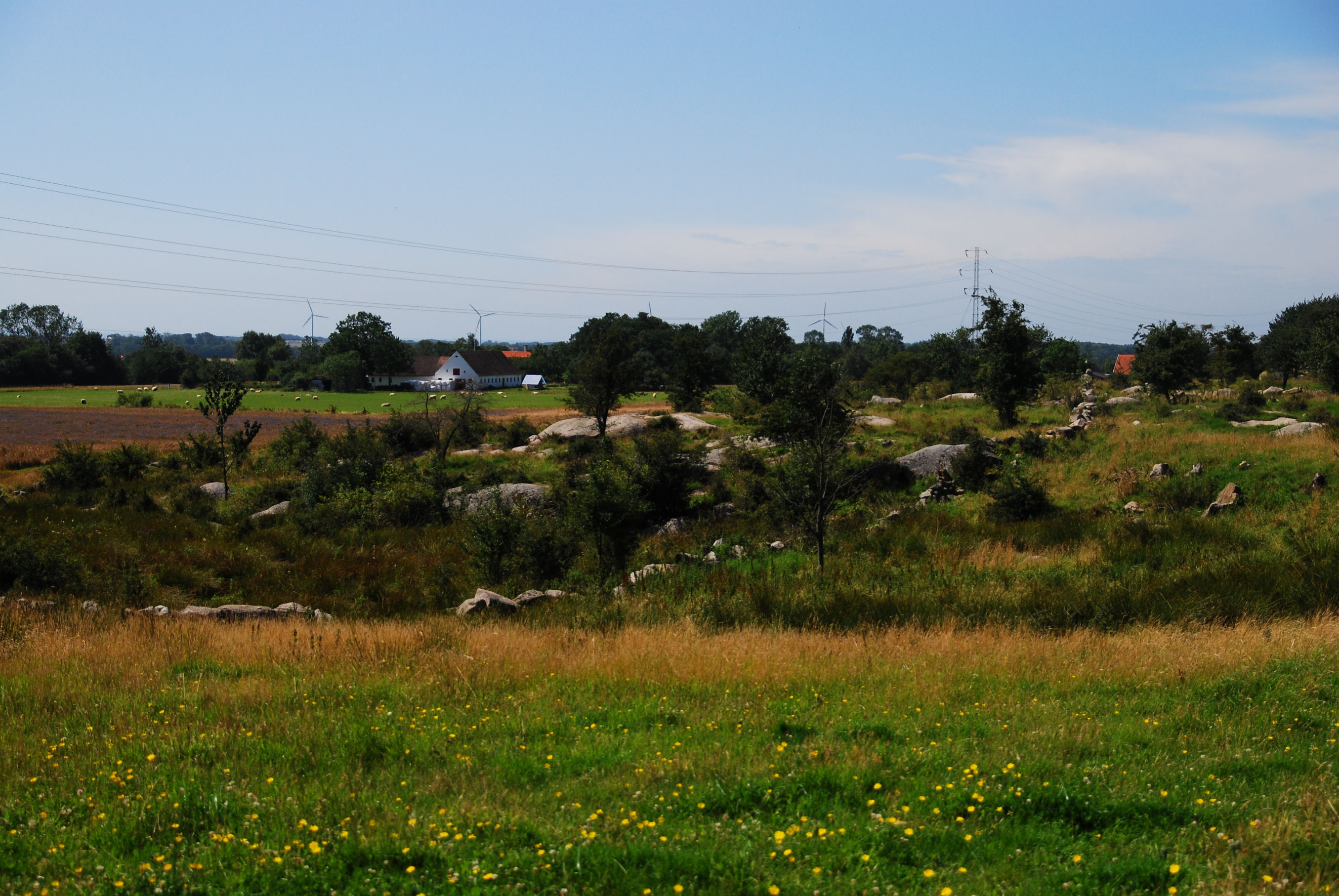 Aakirkeby